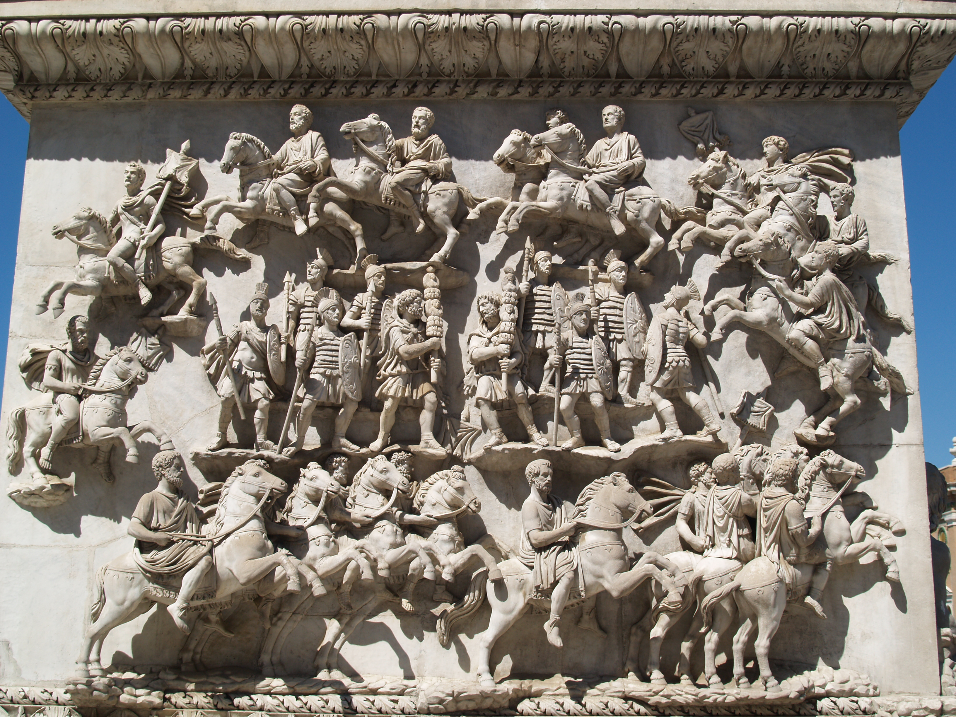 Columna de Antonino Pío. Museos Vaticanos.